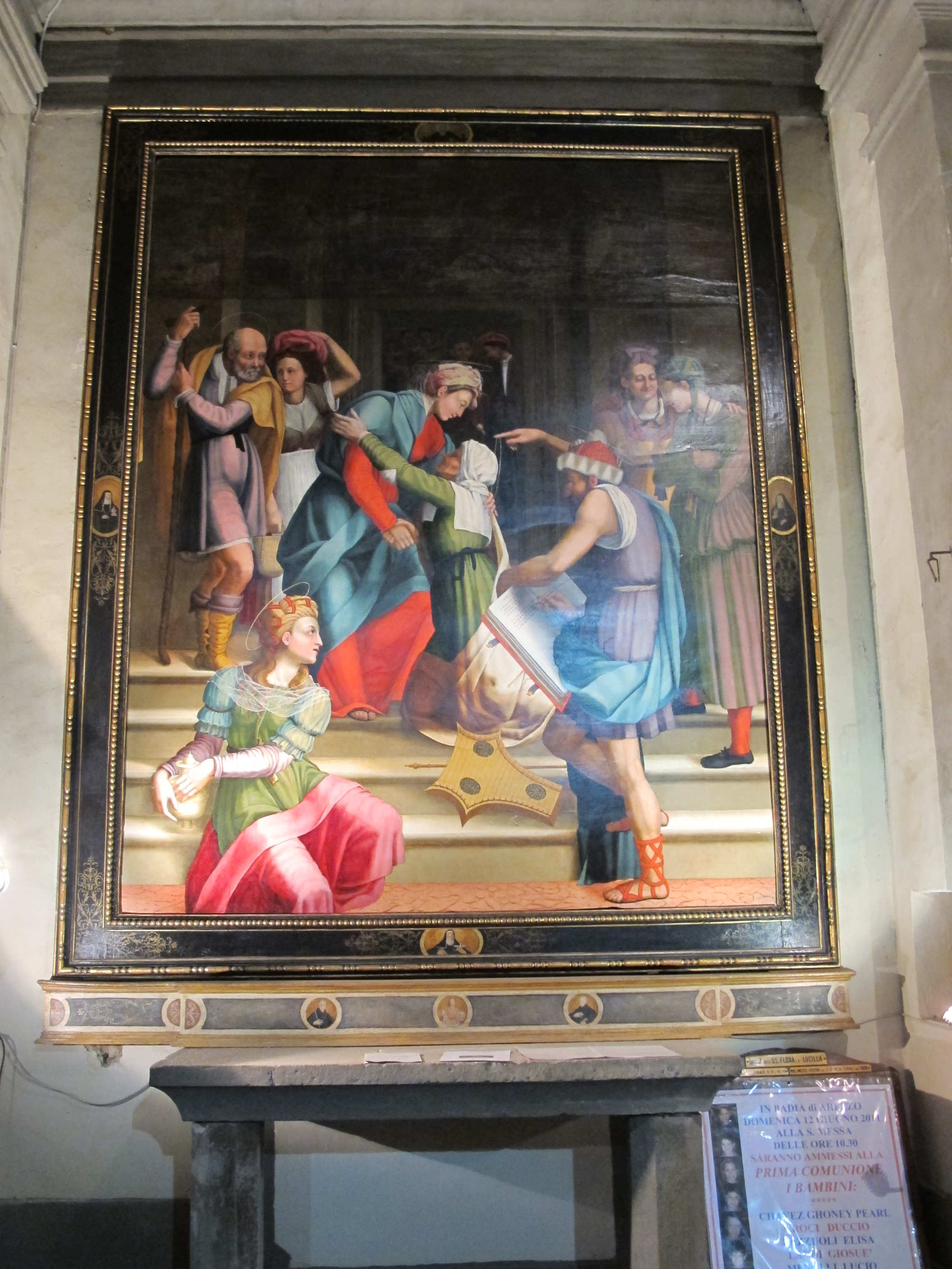 visitazione